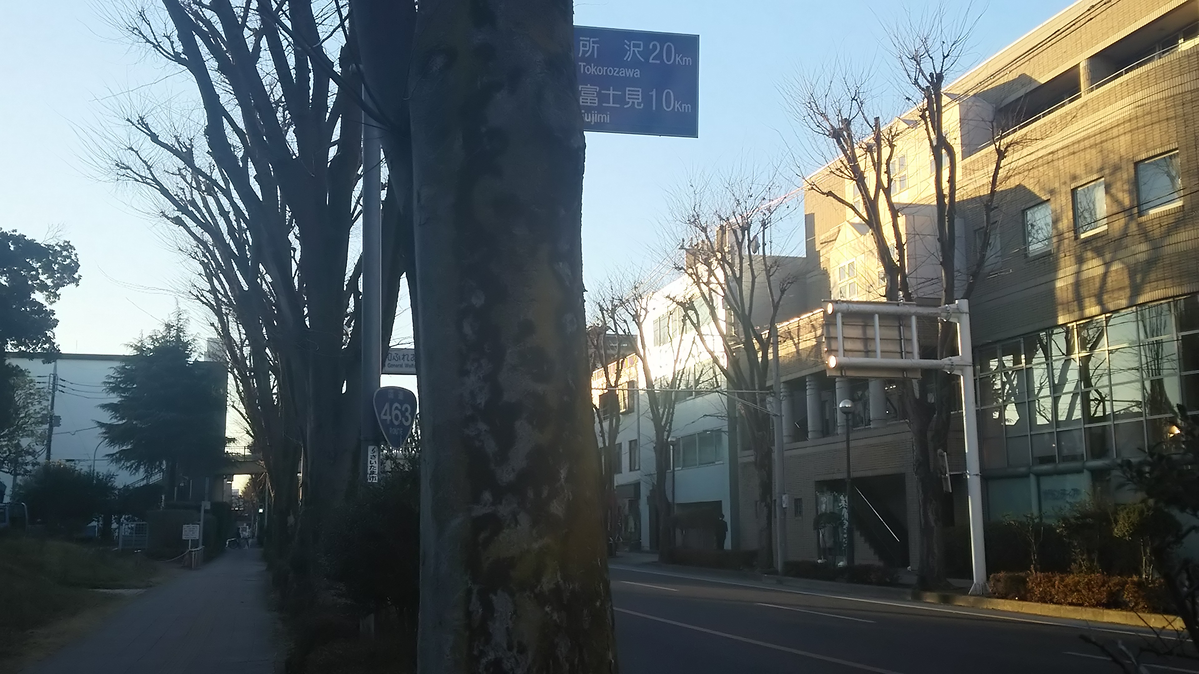 国道463号 北浦和駅付近